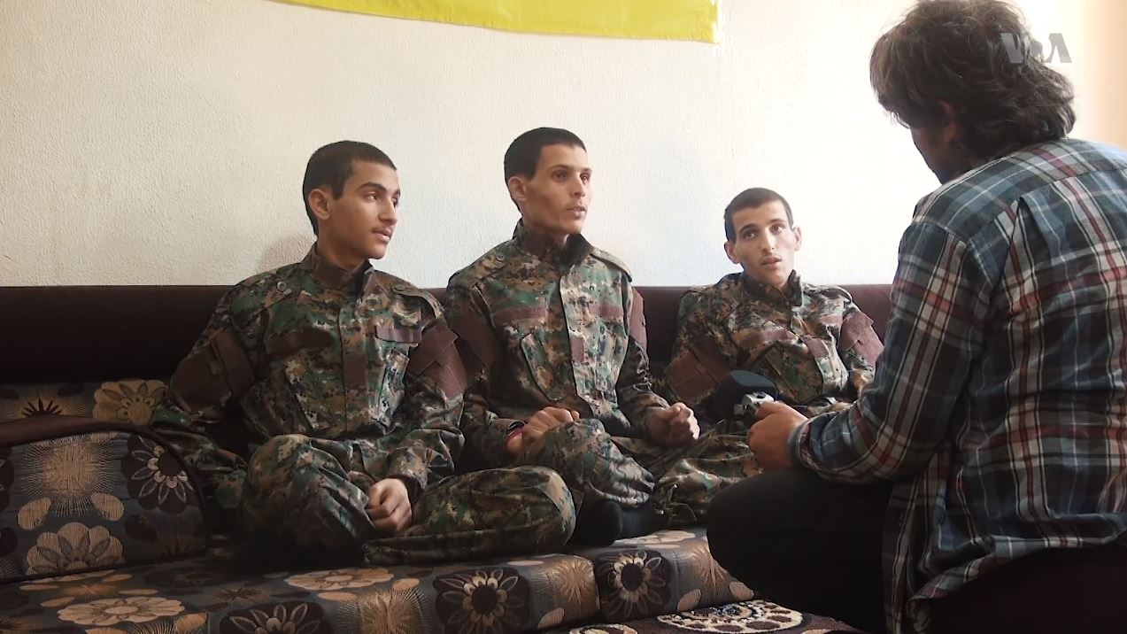 Combattants des Forces démocratiques syriennes le 7 mars 2019, libérés après avoir été détenus par l'Etat islamique.